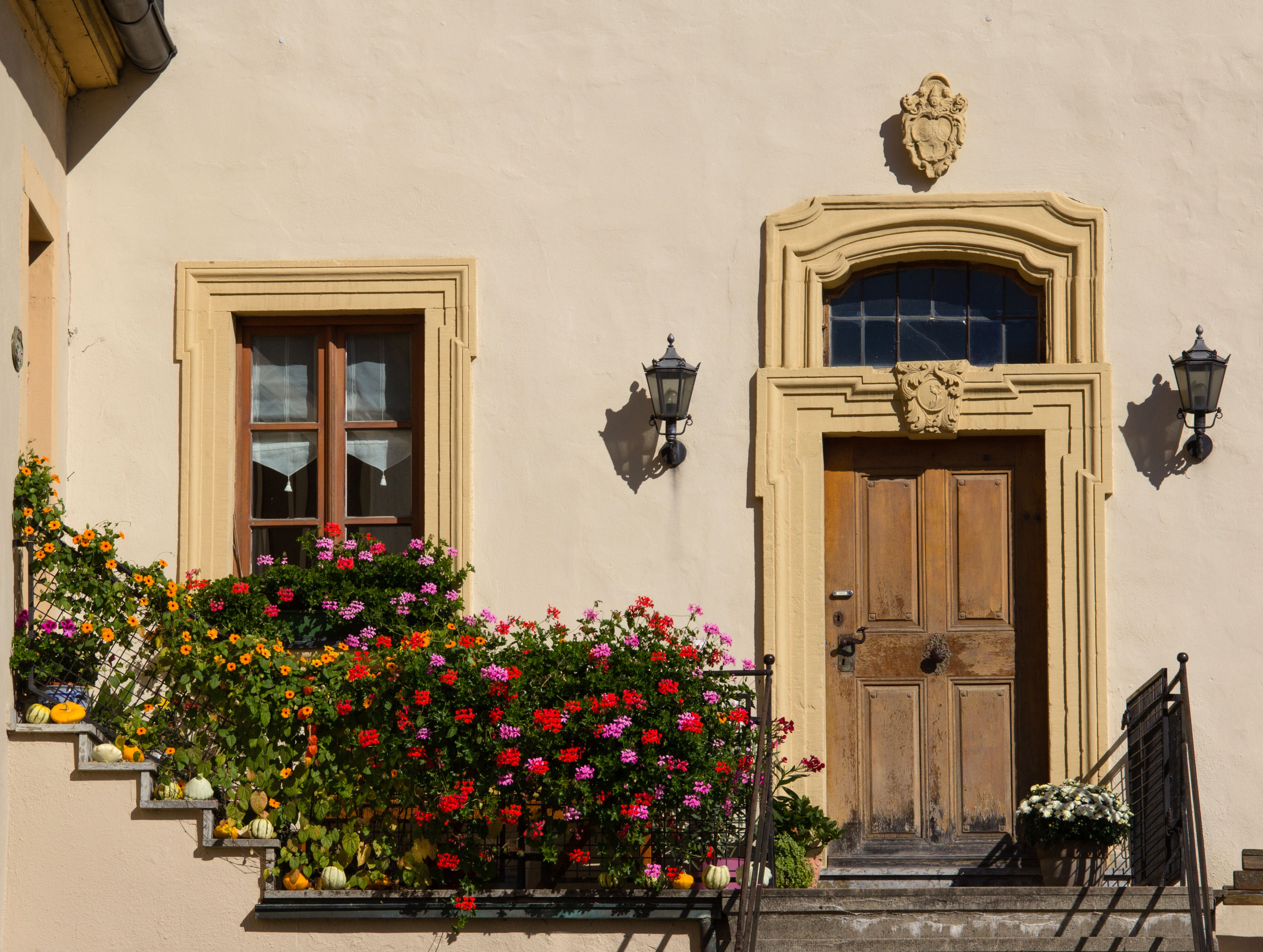 Elgersheimer Hof, Landkreis Kitzingen, Bavaria.